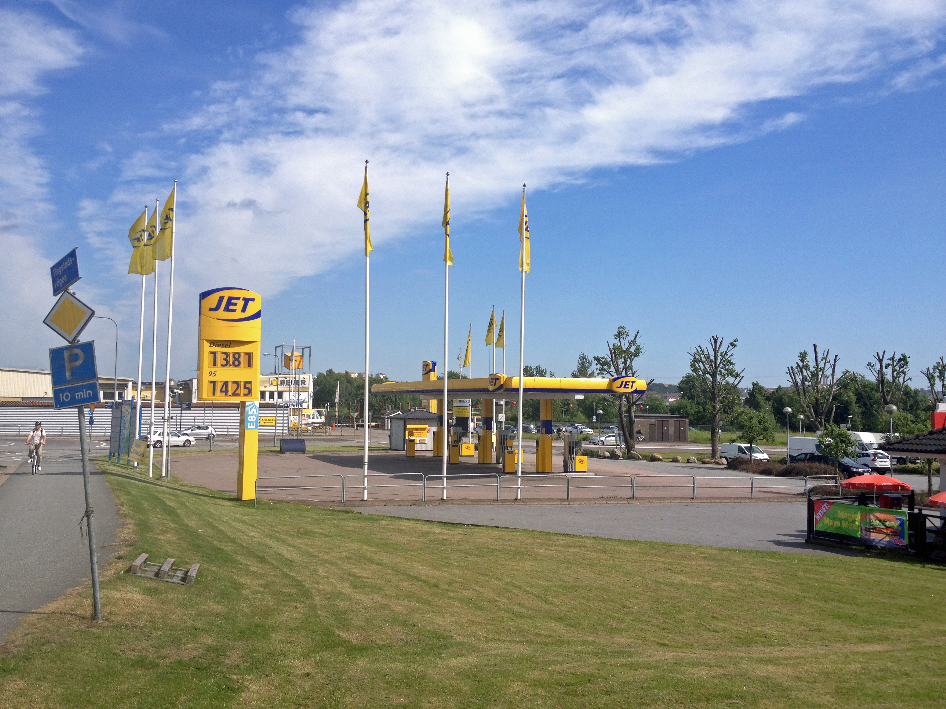 Jet Tingstad Göteborg